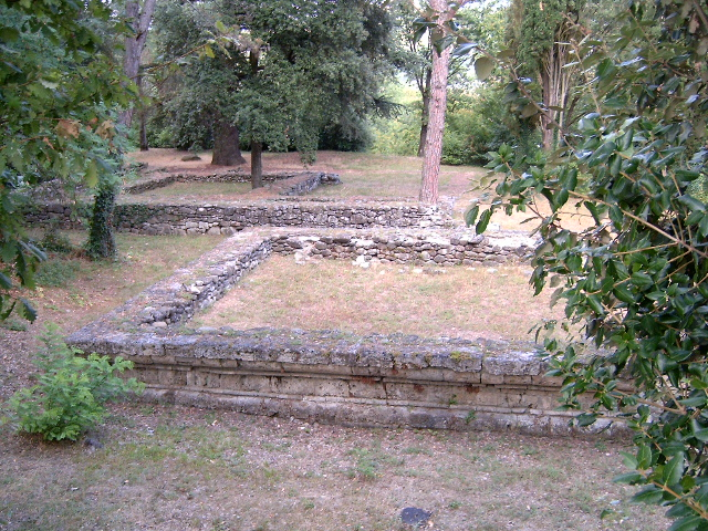 Marzabotto tempels Marzabotto temple acropolis